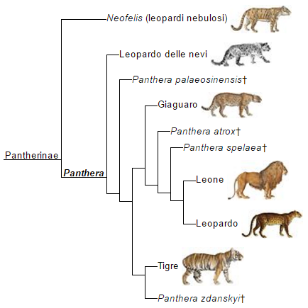 Phylogeny of hyaenidae